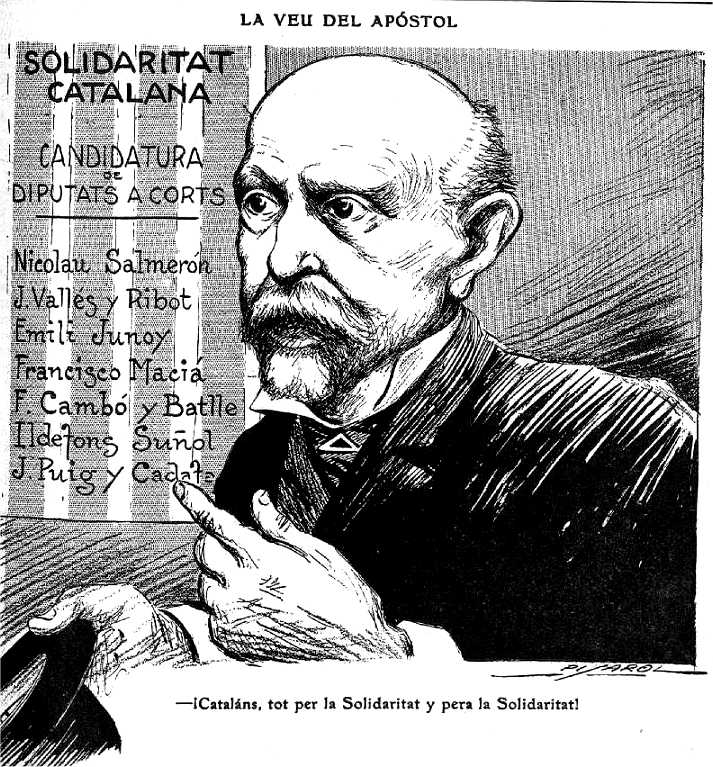 Nicolau Salmeron - La veu del apostòl - "Solidaritat catalana candidatura de diputats a corts - Nicolau Samleron, J. Valles y Ribot, Emili Junoy, Francisco Macia, F. Cambò y Batlle, Ildefons Suñol, J. Puig y Cadate"